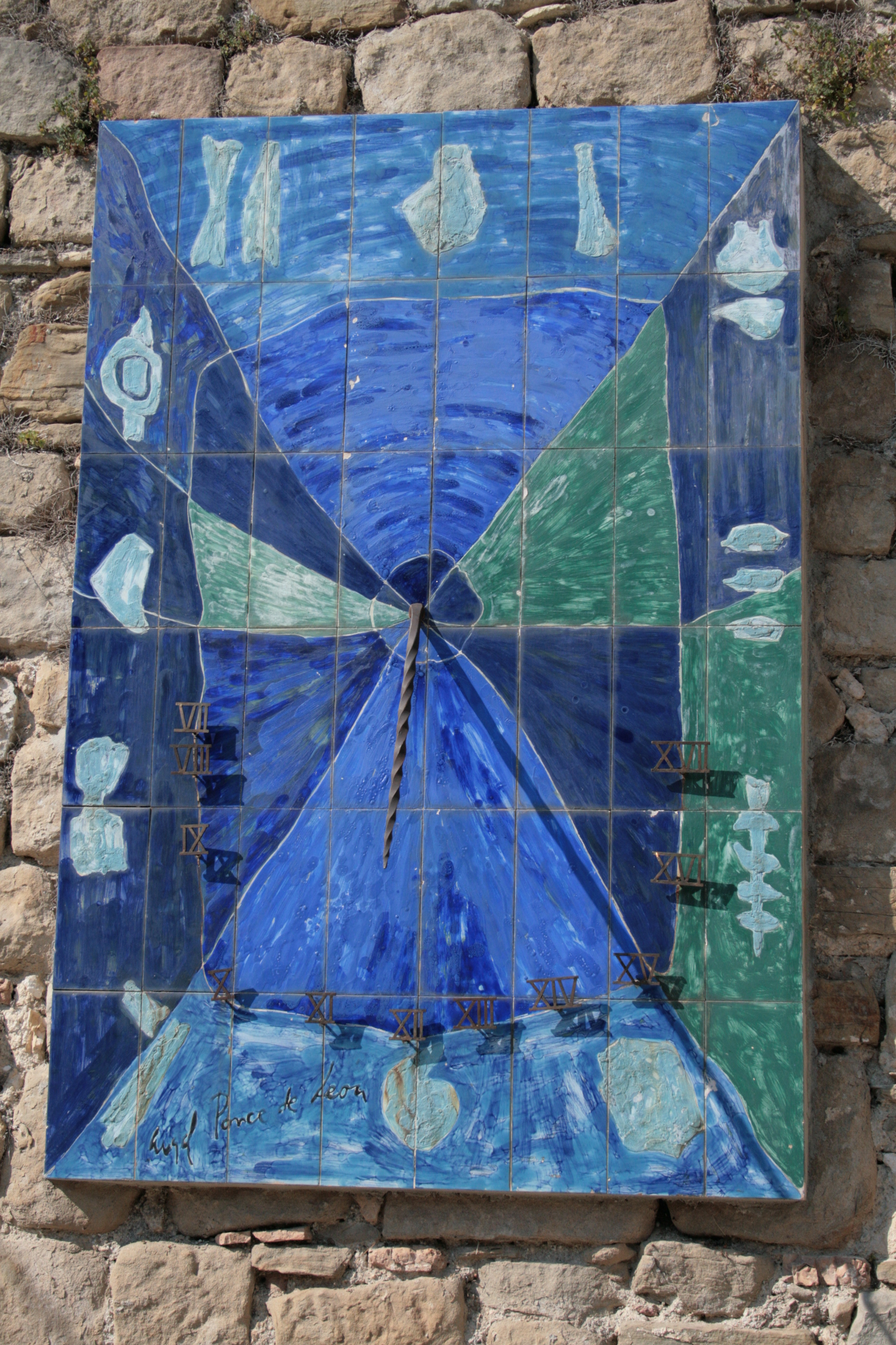 Coaraze, Alpes-Maritimes, Ffrance, cadran solaire, Ponce de Léon, 1961